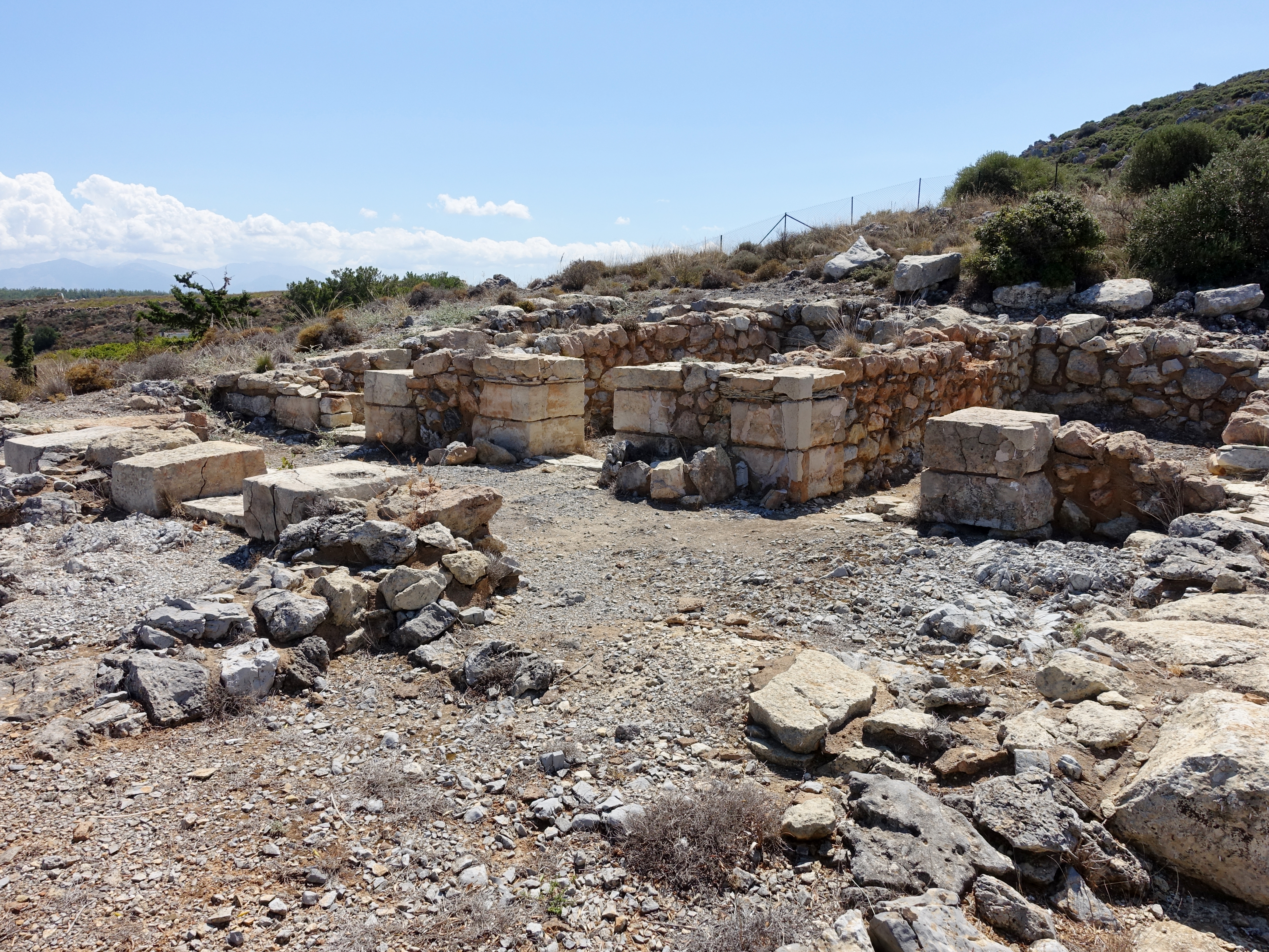 Ausgrabungsstätte Anemospilia bei Archanes, Gemeinde Archanes-Asterousia, Kreta, Griechenland